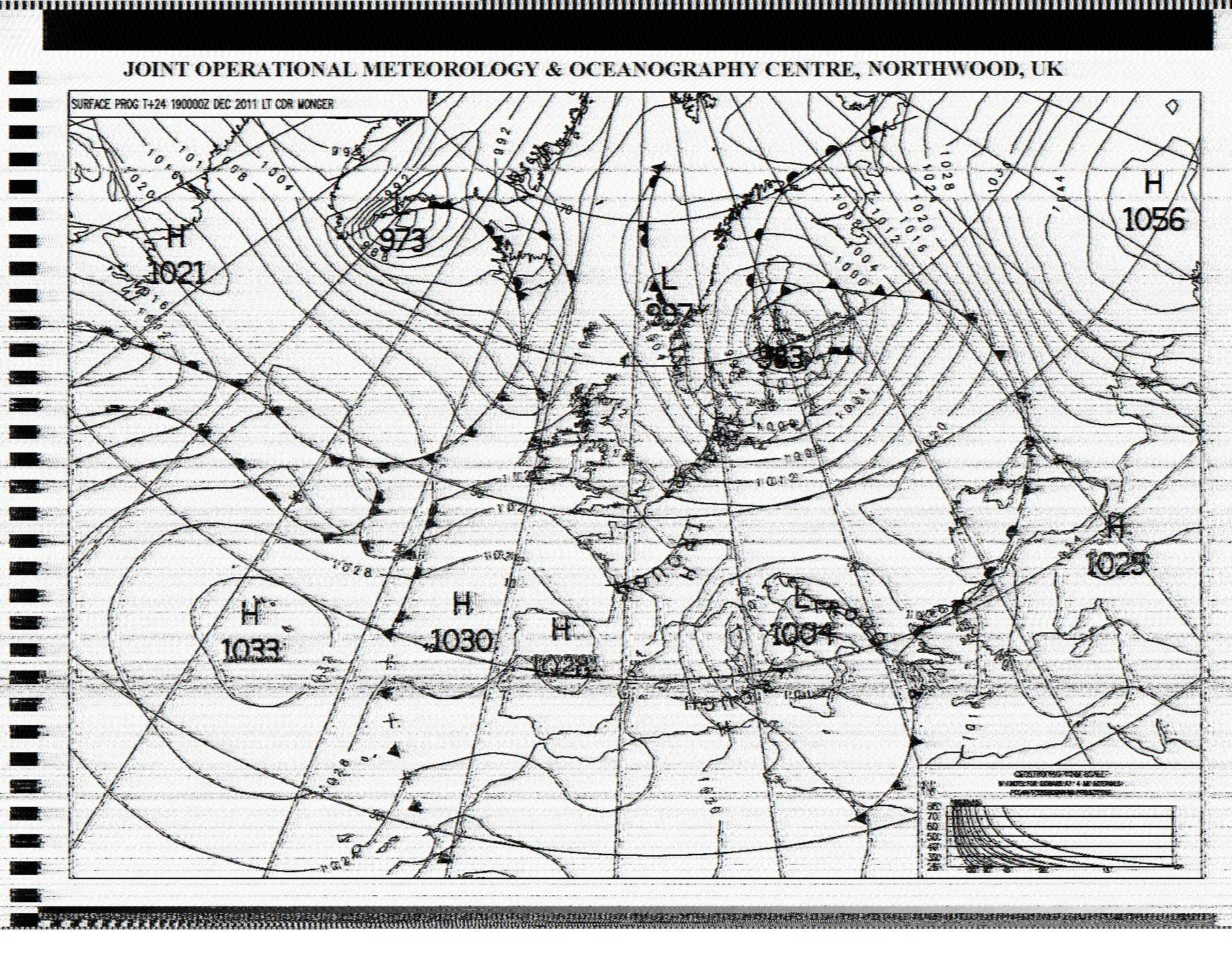 Image météorologique envoyée par radiofacsimilié par la station britannique de Northwood.